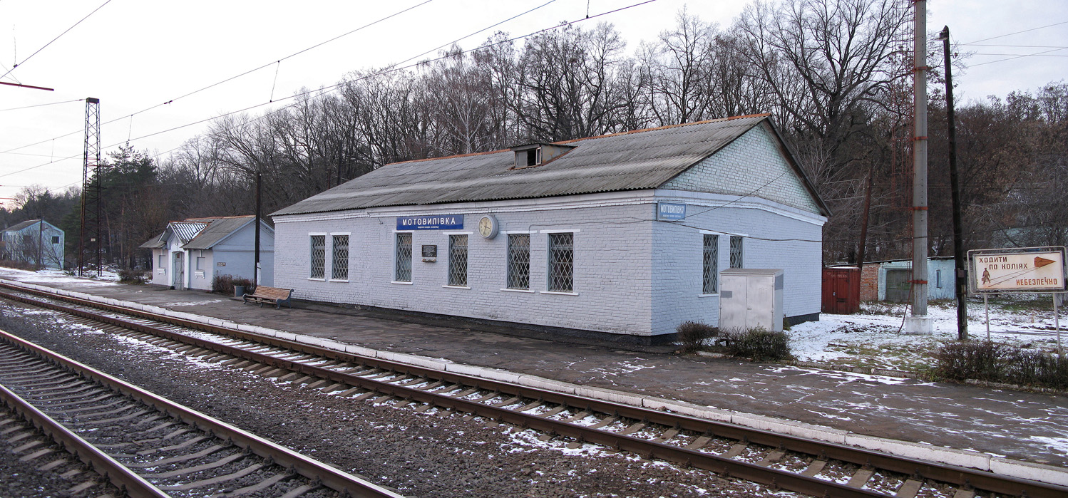 Вокзал ст. Мотовилівка